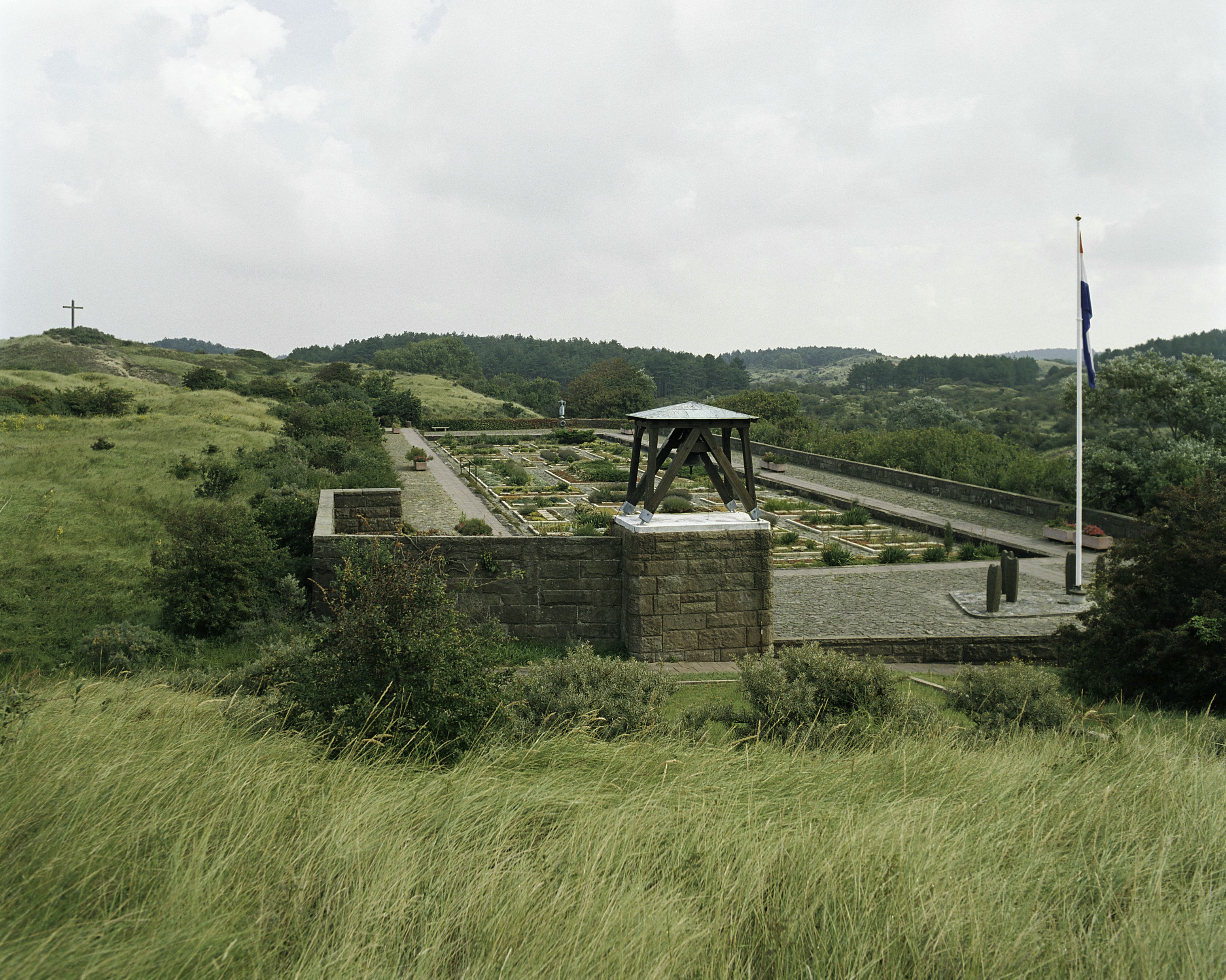 De Erebegraafplaats te Bloemendaal: Overzicht van de erebegraafplaats (opmerking: Gefotografeerd voor Monumenten van Herrezen Nederland)